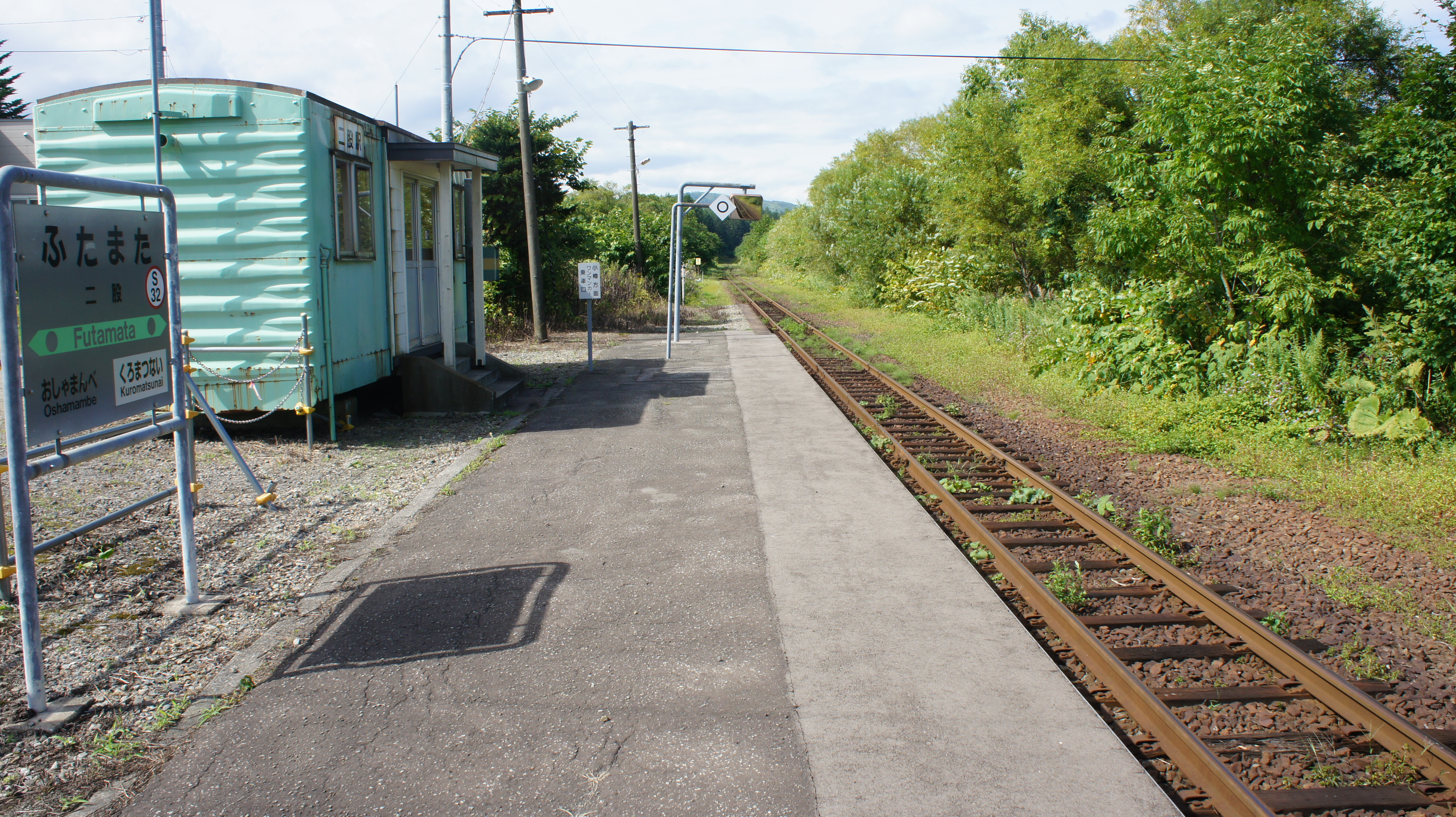 JR函館本線・二股駅のホーム Sony NEX-3